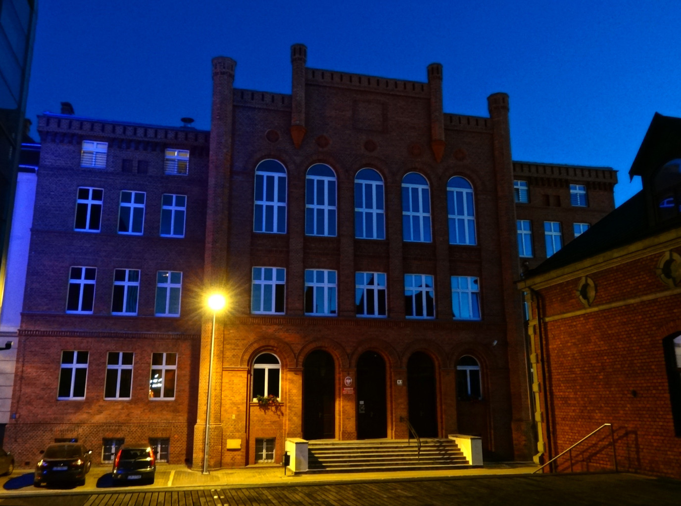 Budynek Seminarium Duchownego w Bydgoszczy, 1858 r.